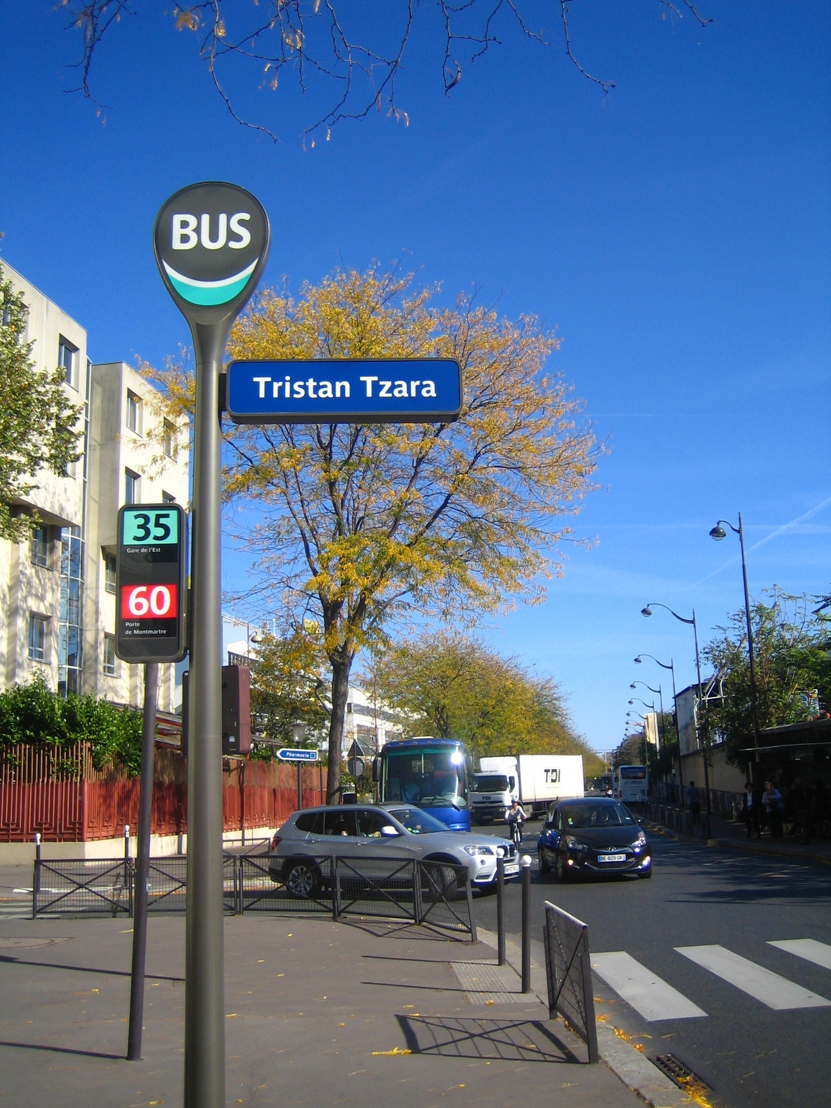 La rue Tristan-Tzara située à Paris dans le 18e arrondissement débute à gauche au niveau du 35, rue de l'Évangile.